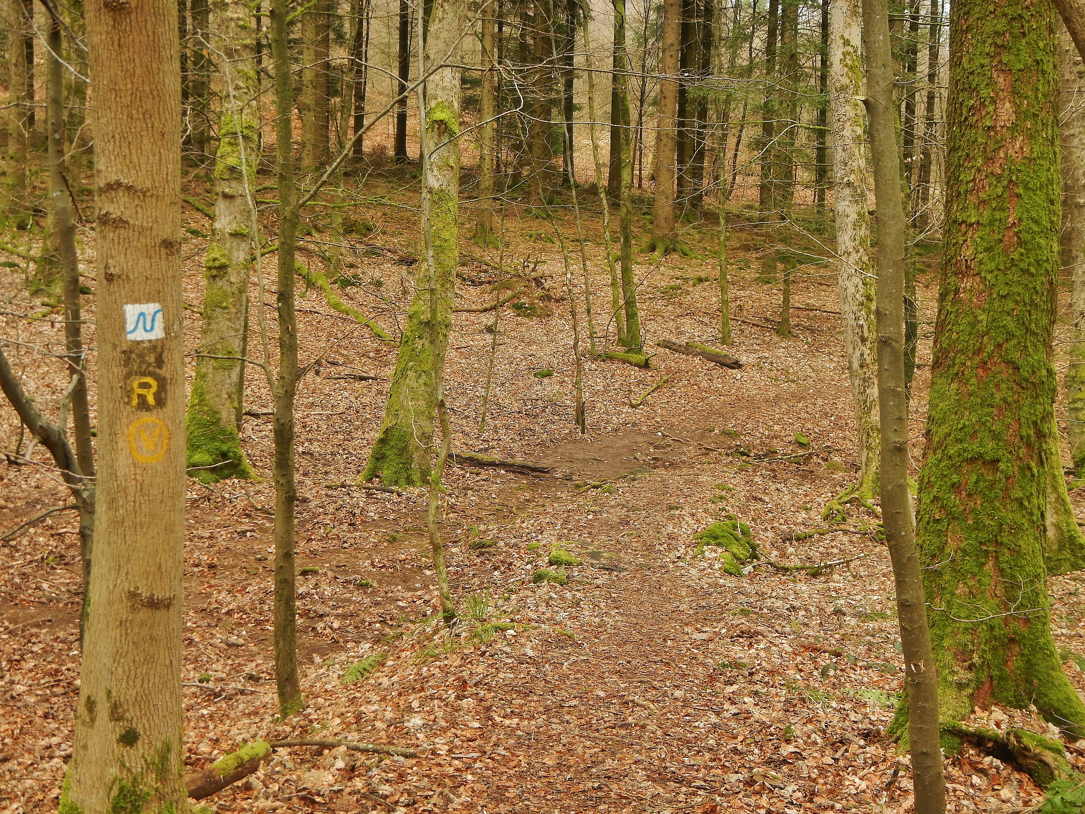 Das ist der 127 km lange Neckarsteig und nicht der 366 km langen Neckartalradweg.